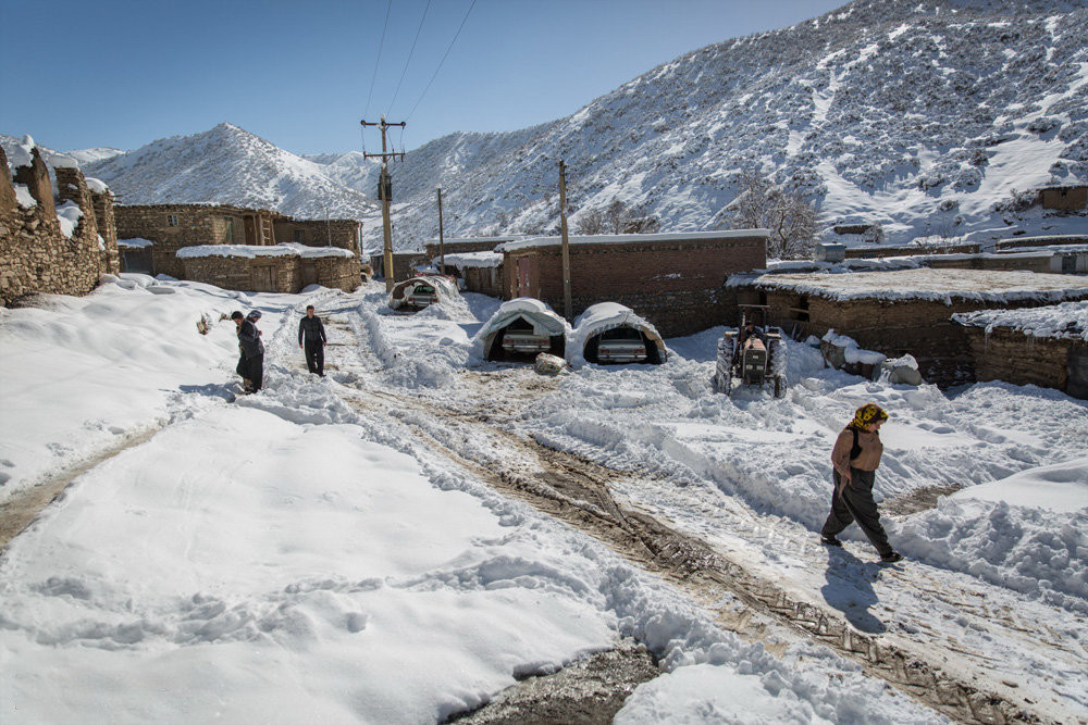 مناطق سردسیر و دیدنی کردستان به دلیل جریان زندگی سنتی و اصیل همواره از جاذبه‌های گردشگری این استان بوده و مردم در این مناطق به خوبی با شیوه زندگی در نقاط بکر و دست‌نخورده آشنا هستند. بلکر یکی از روستاهای زیبا در ۸۵ کیلومتری مریوان است، مردم این روستا به شیوه سنتی لباس می‌پوشند و به مشاغل سنتی نیز مشغول هستند. زنان و مردان در کنار یکدیگر به دامداری اشتغال دارند و وظیفه تربیت و نگهداری از فرزندان نیز بر عهده زنان روستا است. بارش برف در برخی ماه‌های سال به اندازه‌ای است که رفت و آمد و زندگی روزمره را دچار مشکل می‌کند، مردان روستا از صبح به پشت‌بام‌ها و خیابان‌ها می‌روند و به کمک پاروی چوبی برف‌روبی می‌کنند تا مردم و کودکان بتوانند در روستا تردد کنند. خانواده‌هایی که زمستان را در روستای بلکر سپری می‌کنند، به یکدیگر کمک می‌کنند تا با عشق و امید به کمبود امکانات و سرمای زمستان غلبه کنند.